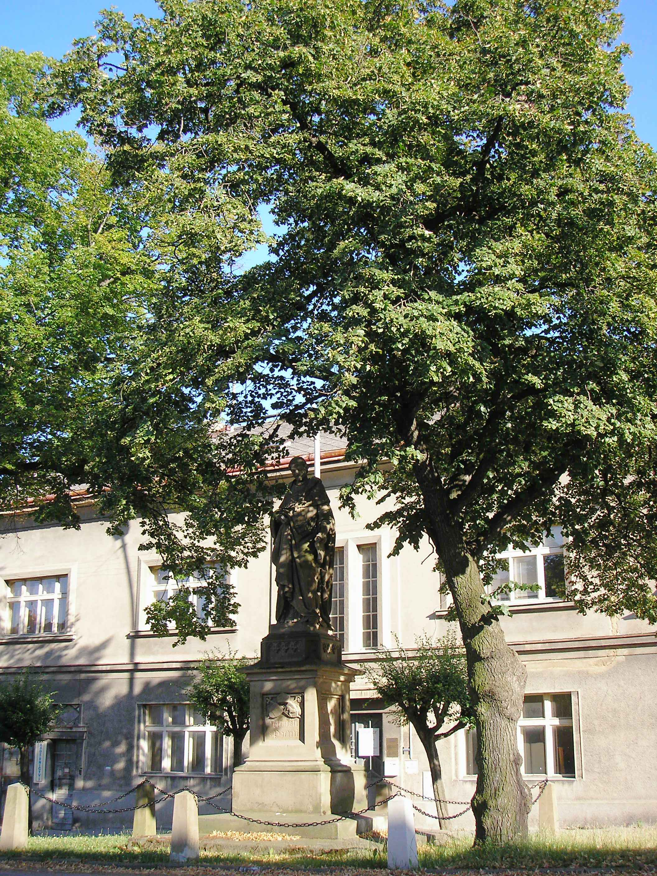 Socha Arnošta z Pardubic v Úvalech